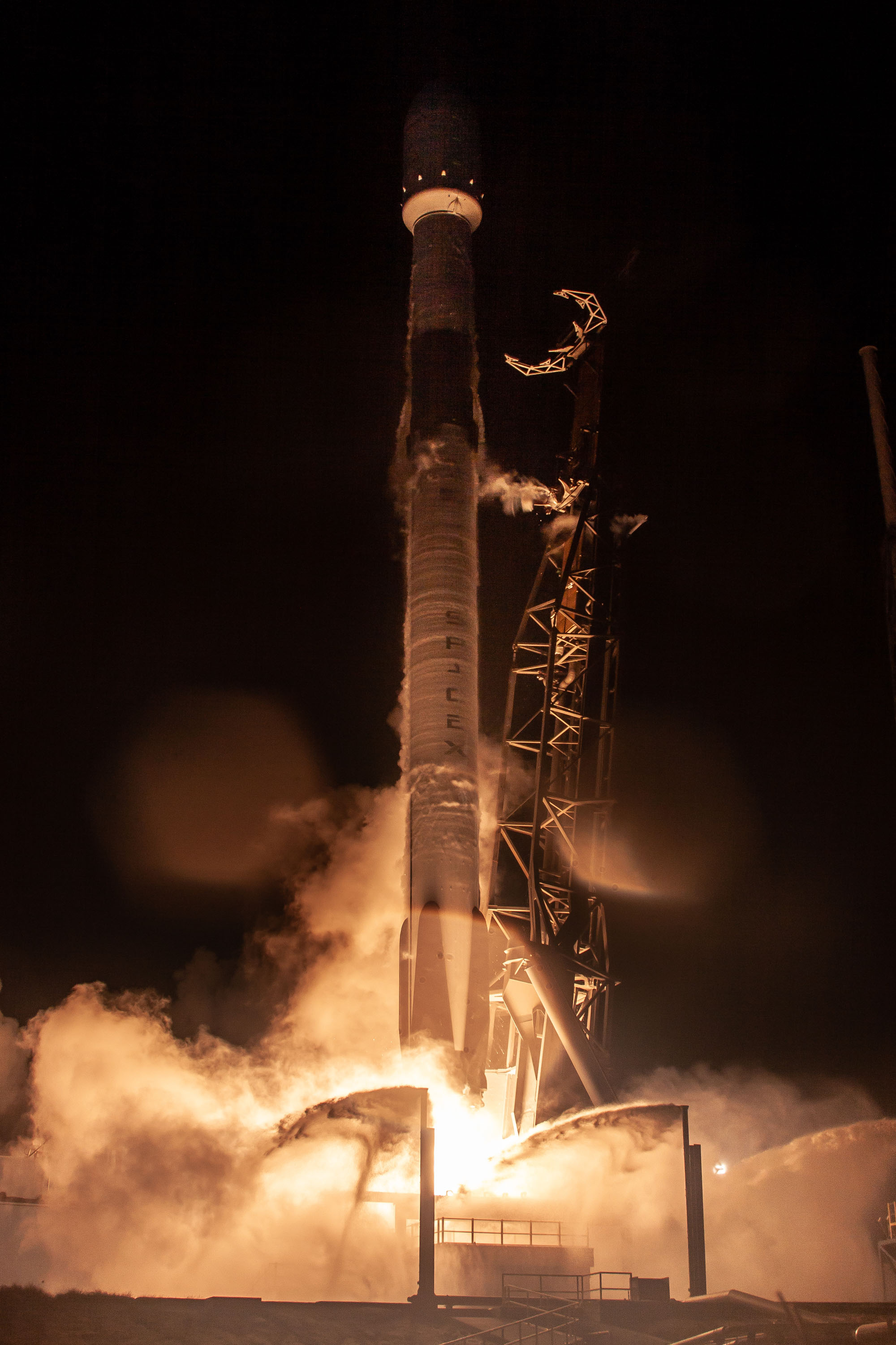 Telstar 18 Vantage Mission